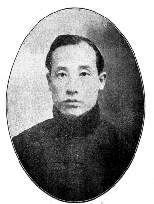 中文（台灣）: 中華民國國會議員